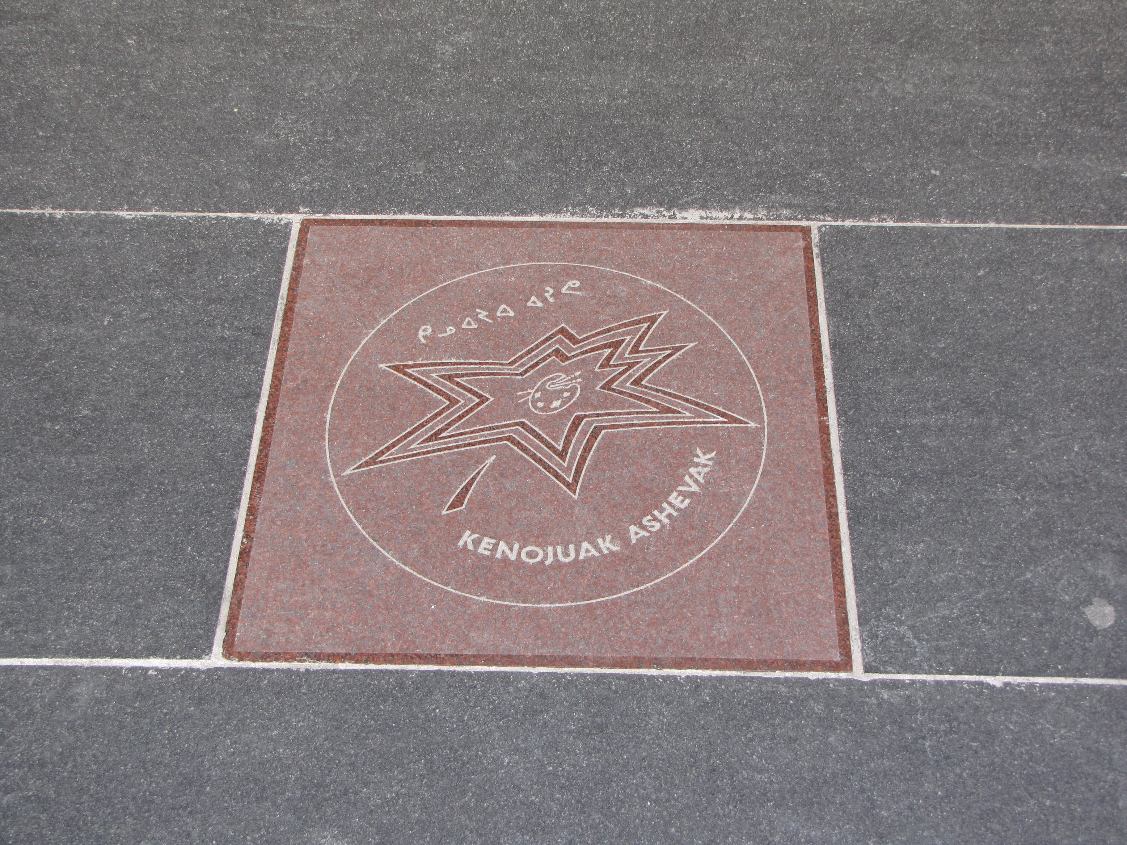 Kenojuak Ashevak's star on Canada's Walk of Fame